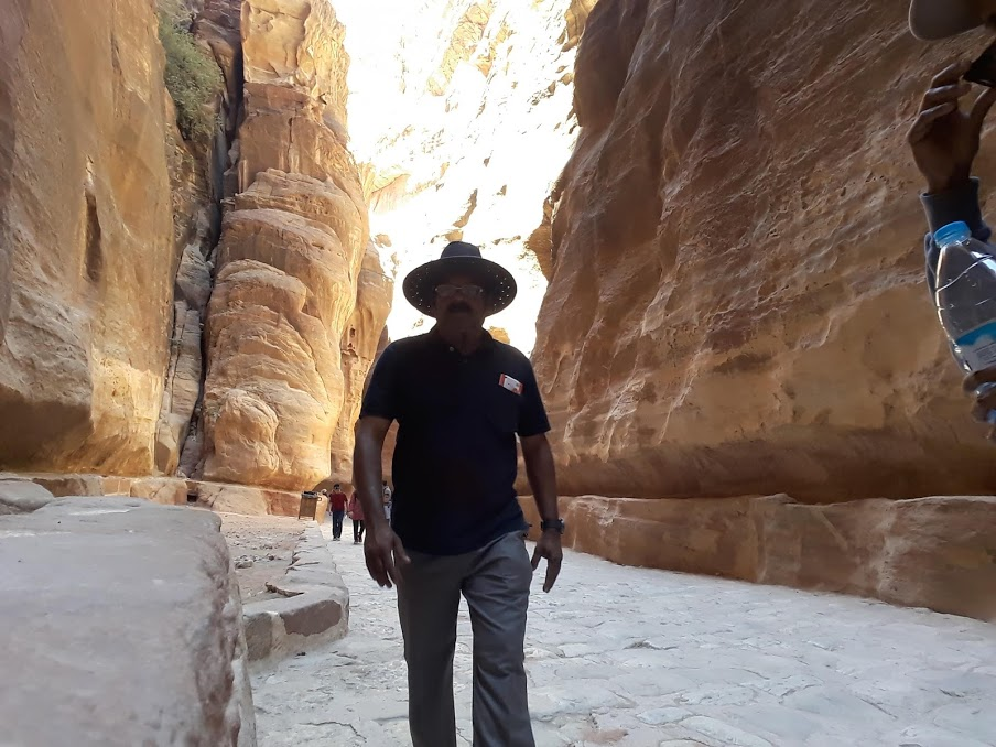 മലയിടുക്കിലൂടെ വീണ്ടും മുന്നോട്ട് ..!